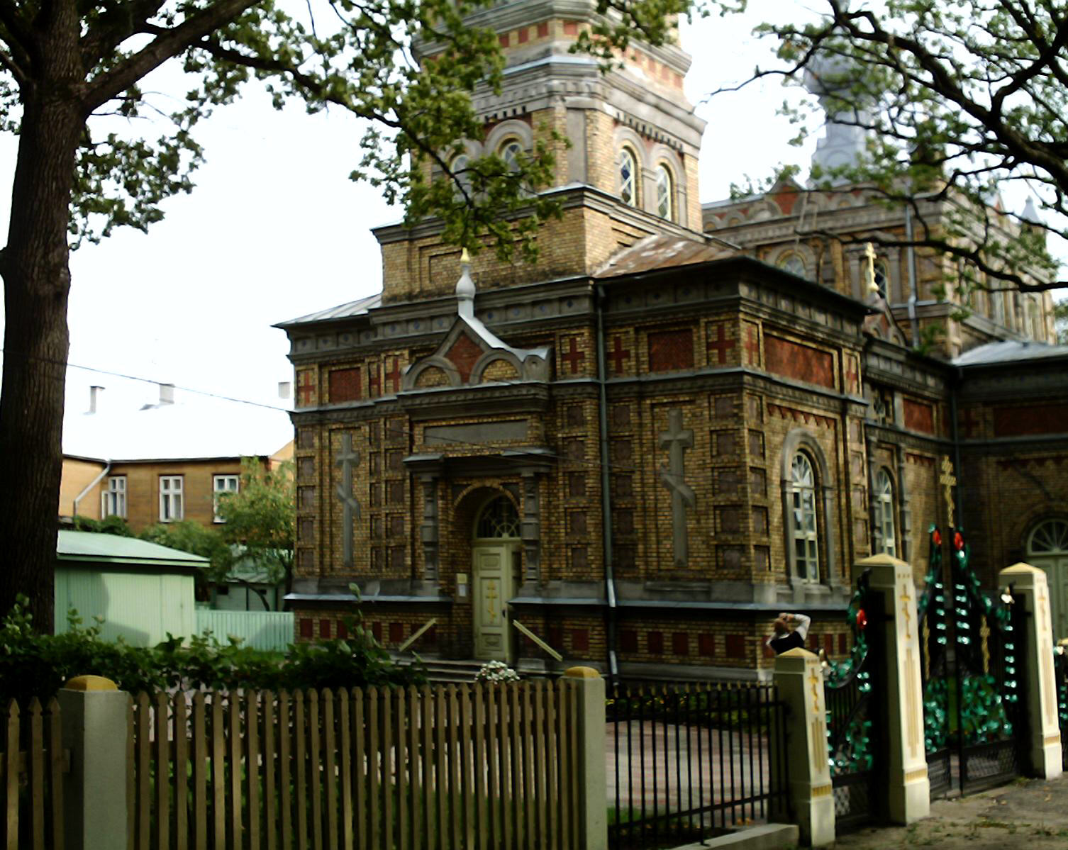 russisch-orthodoxe Kirche in Pärnu